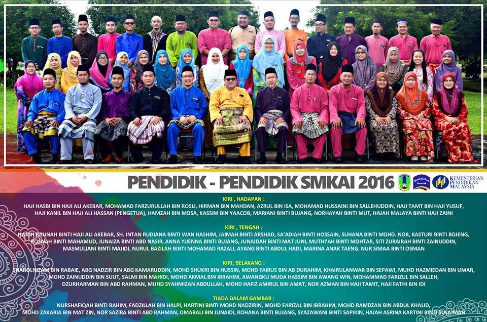 guru - guru